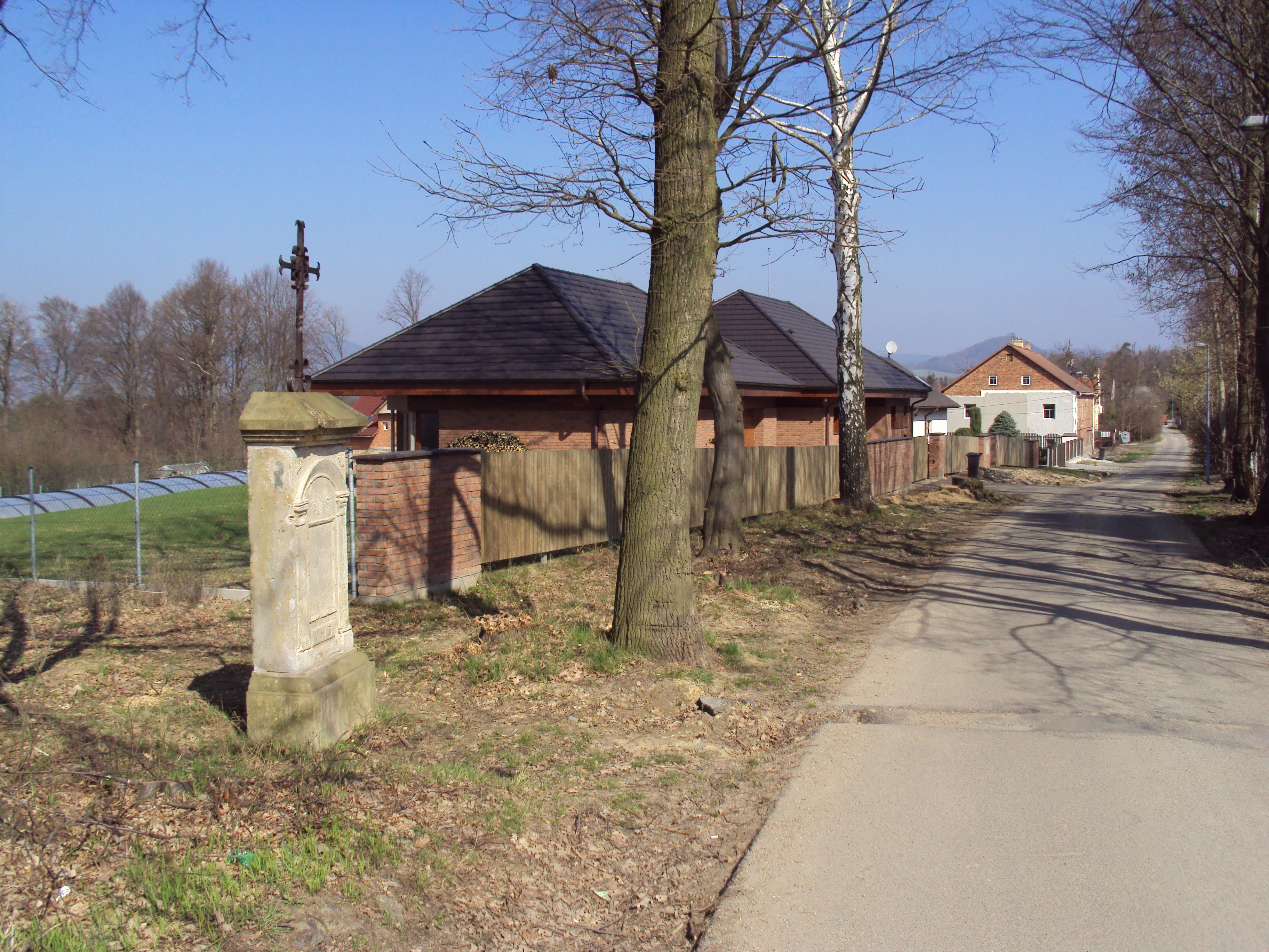 Česky: Křížek na pokraji starých Lad